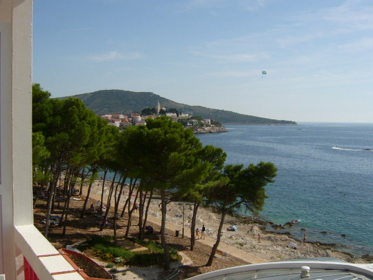 Vidaĵo el hotelo Zora Primoŝten vidata de Hotelo Zora (memfarita foto libere uzebla)